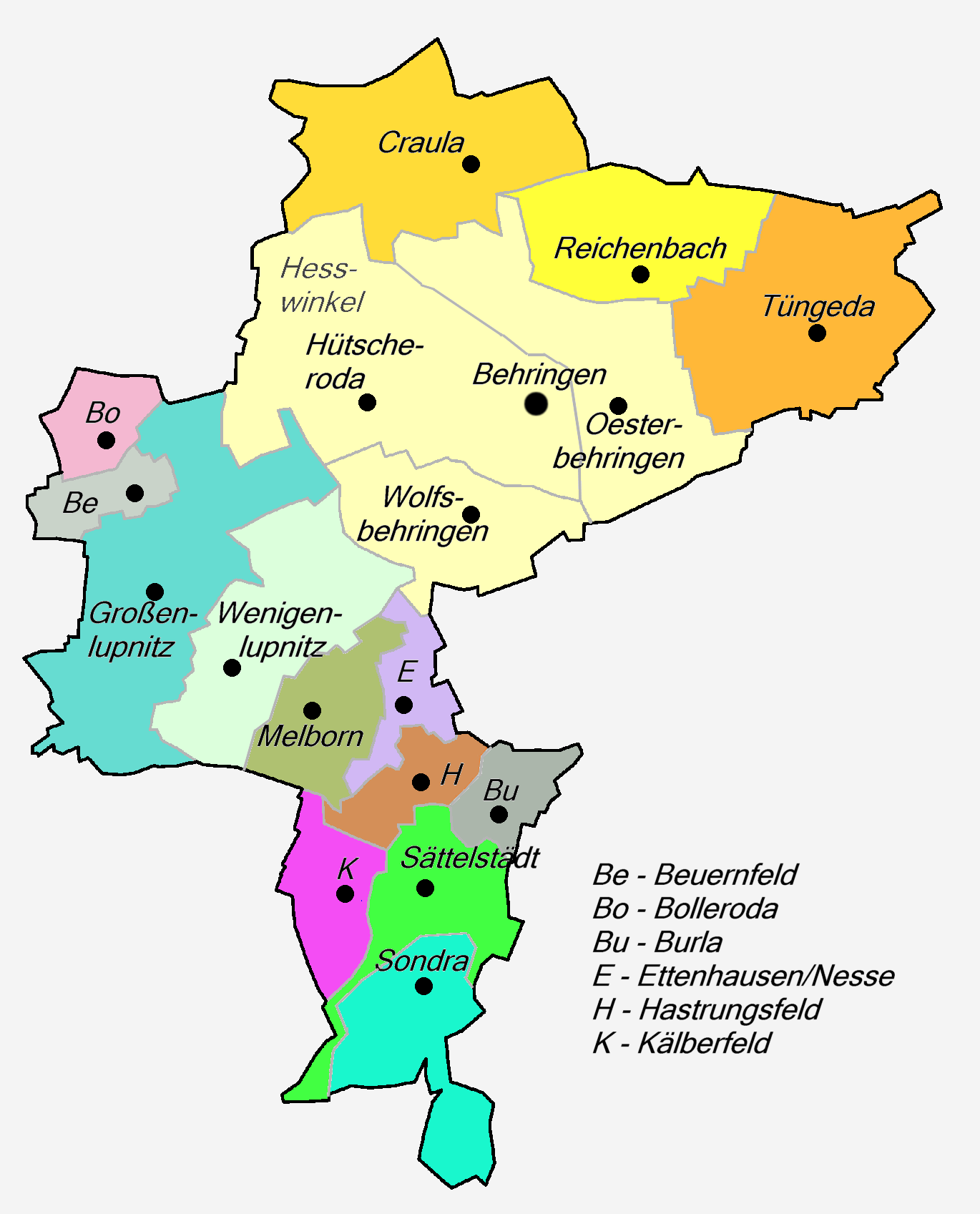 Kartensatz zur Gemeindeentwicklung